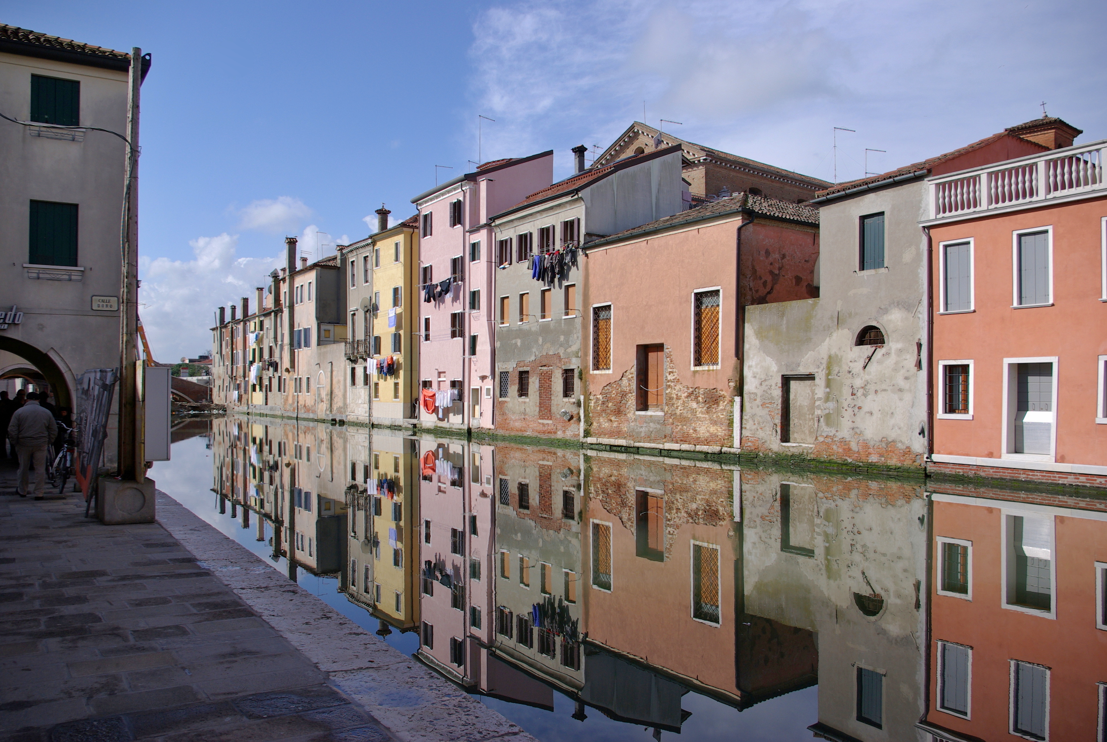 Chioggia